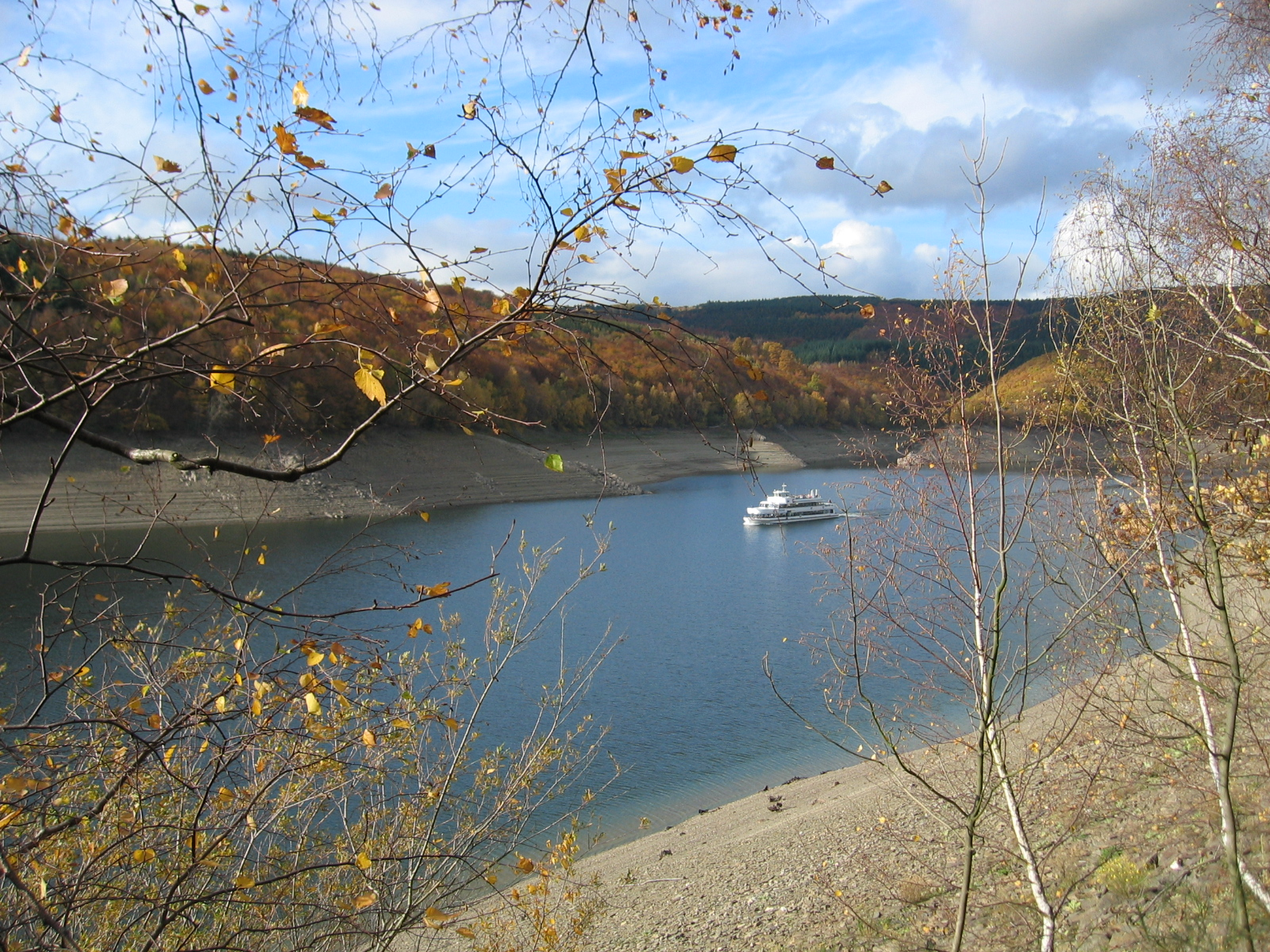 Rursee im November 2011